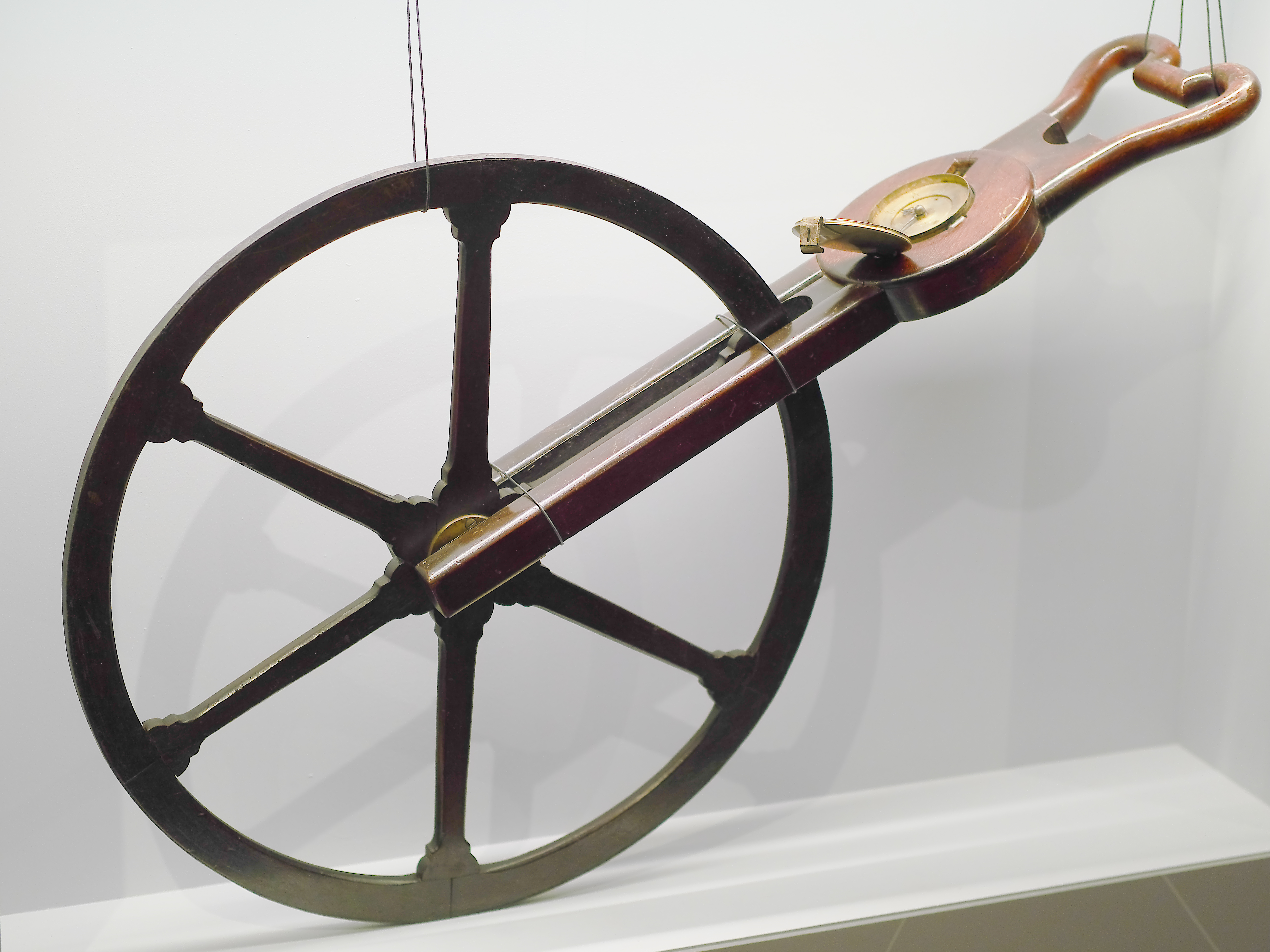 Hodometer aus Holz für den Einhandbetrieb aus London um 1760, Exponat der Ausstellung 2017 vom GeoForschungsZentrum Potsdam